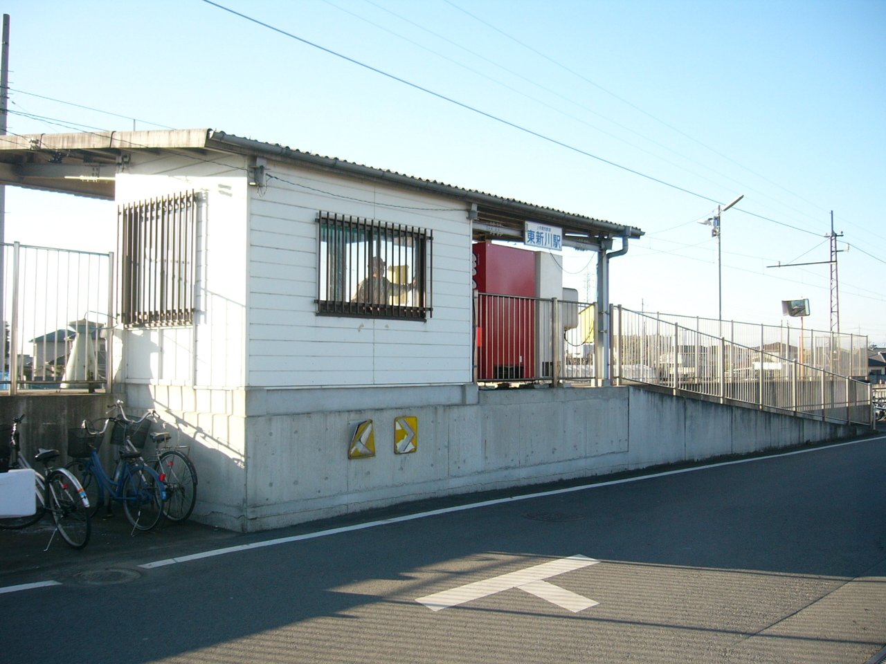 Higashinikkawa Station